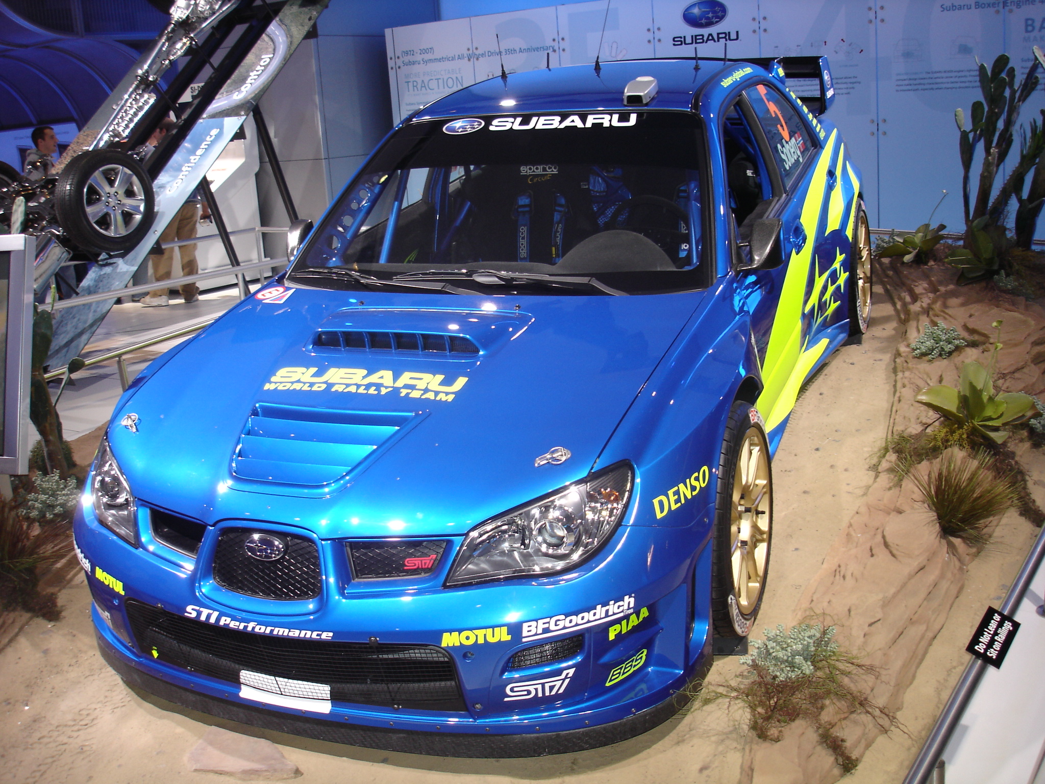 Subaru Impreza WRC2006 rally car.